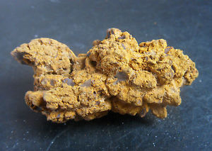 Coprolito (Excremento fósil) de un reptil Cretacico Madagascar